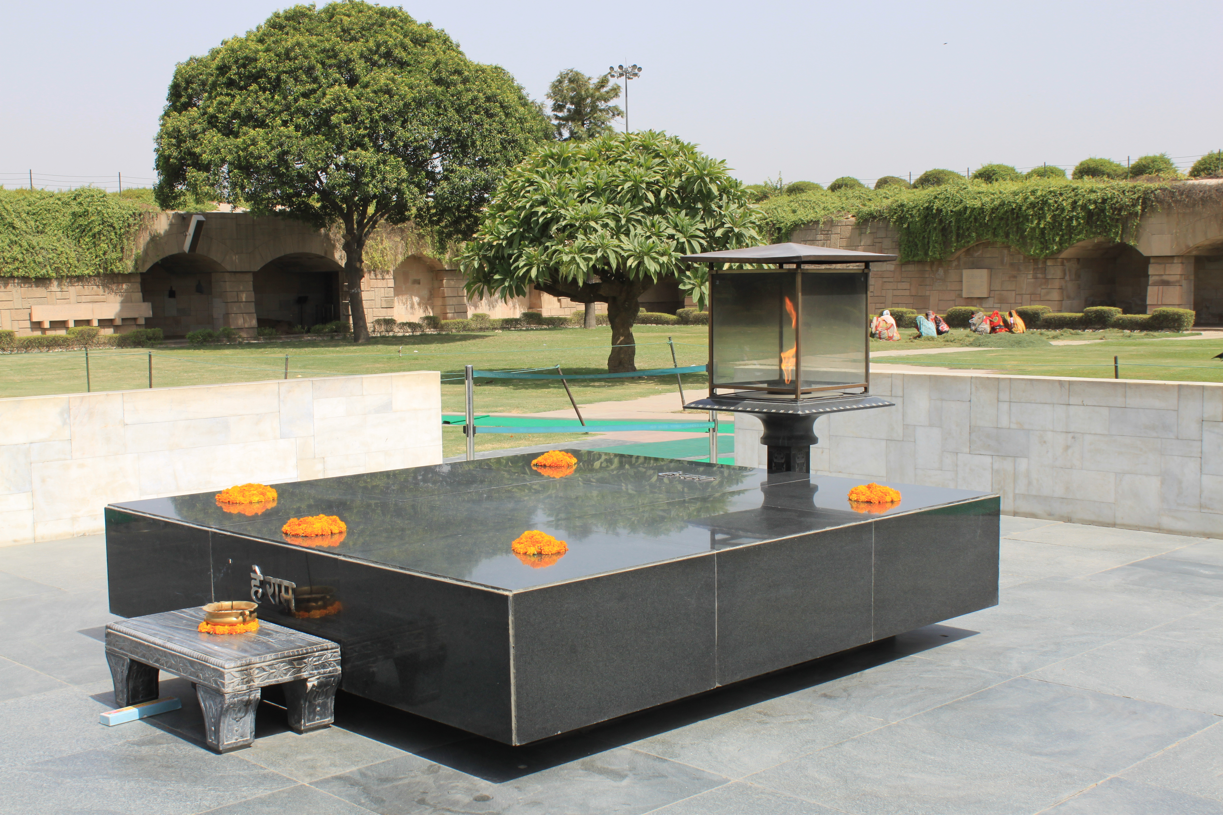 In memoria mahatma gandhi. Delhi. Sitio donde lo incineraron